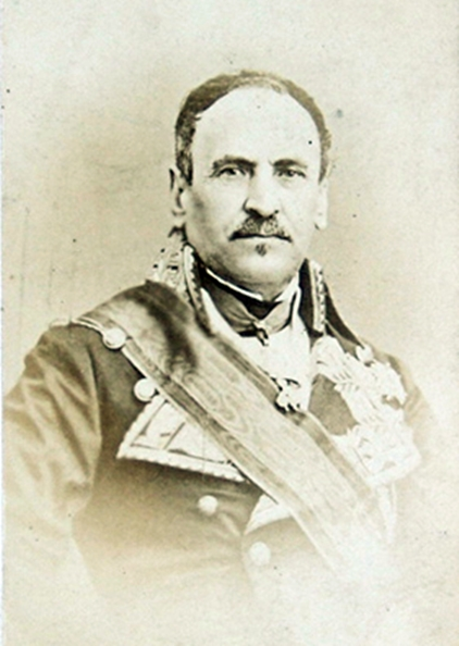 Mariscal Espartero. Duque de la Victoria